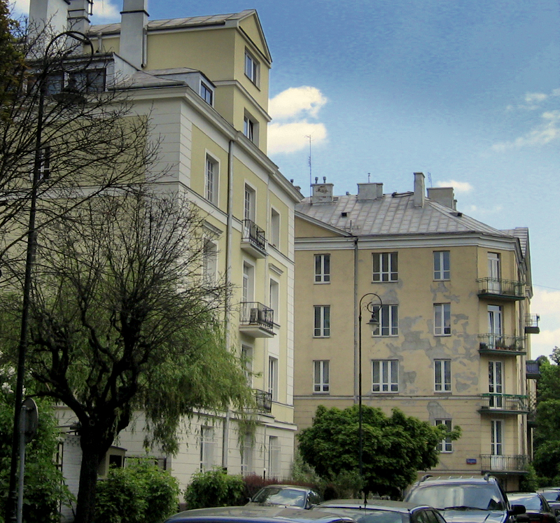 Warszawa, kamienice przy ul. Raszyńskiej (róg Rapackiego)